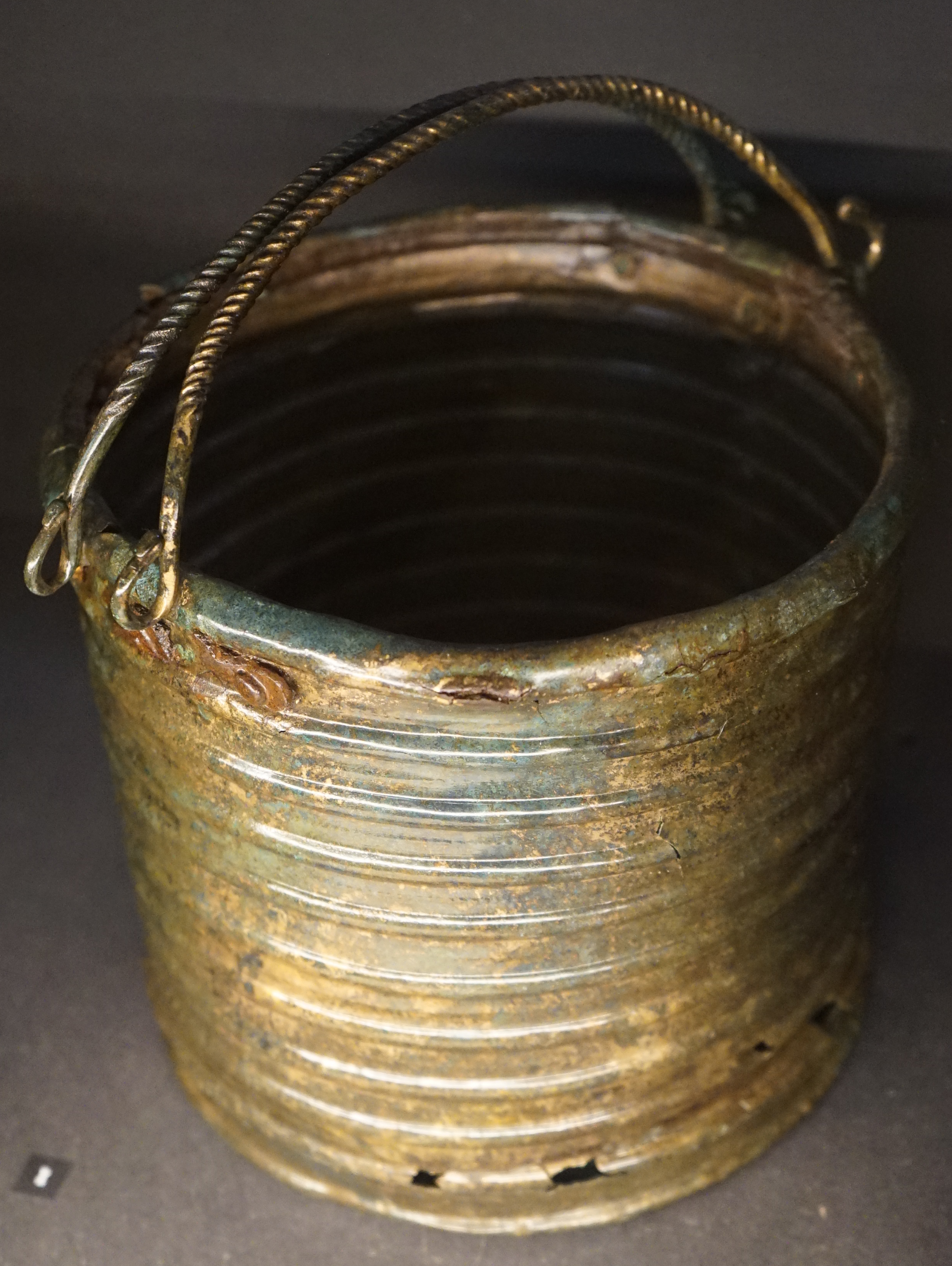 ciste en bronze.